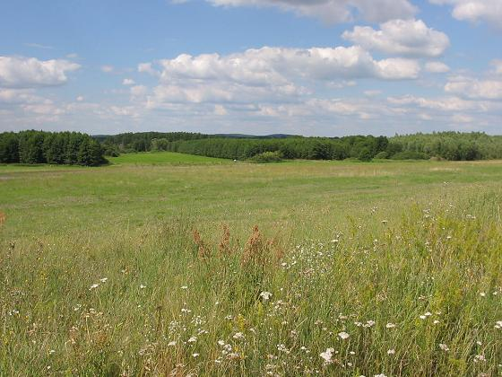 Tal Nieplitz, Pfefferfließ bei Stangenhagen, Brandenburg